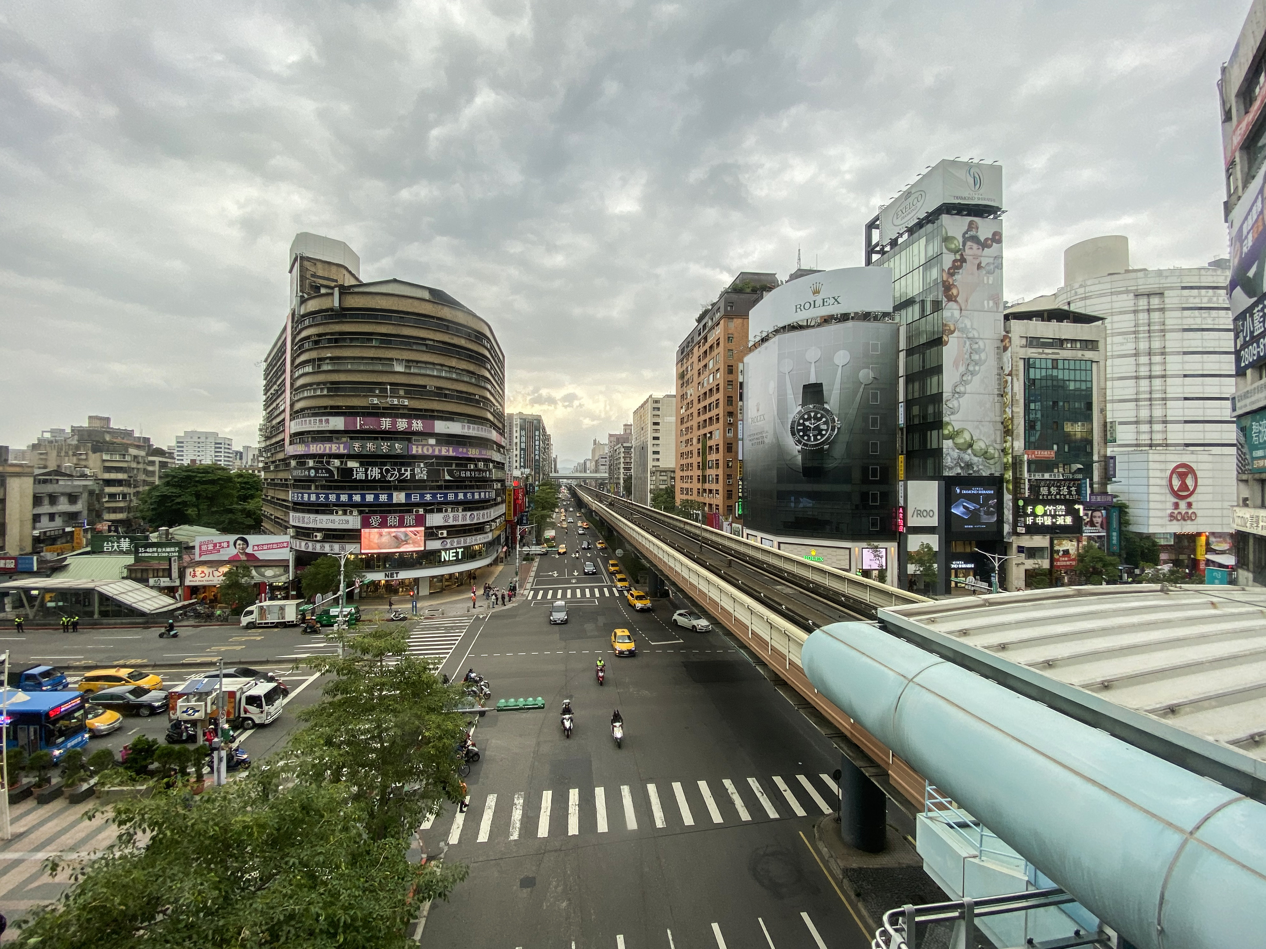 復興南路一段